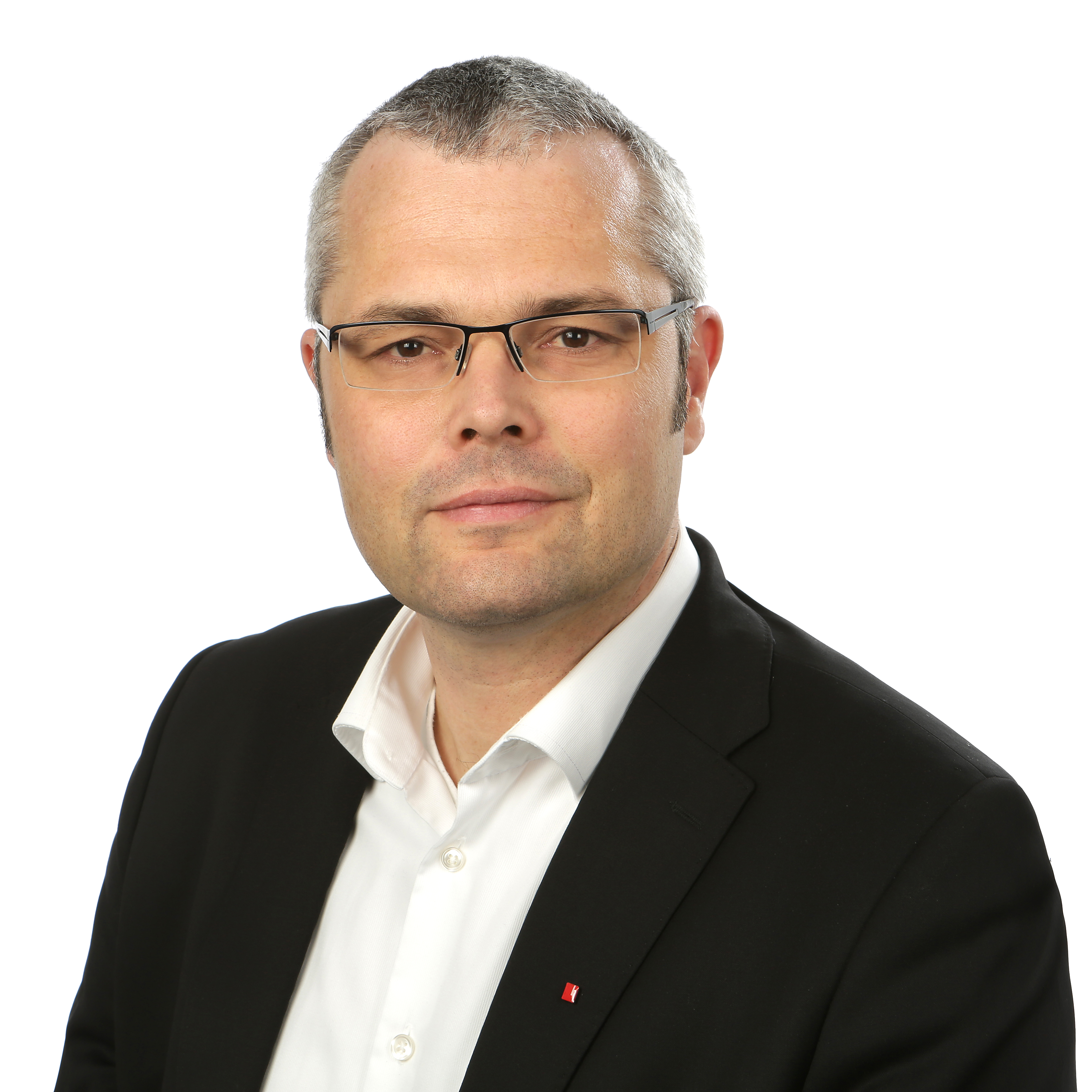 Professor für Logistik, Material- und Fertigungswirtschaft